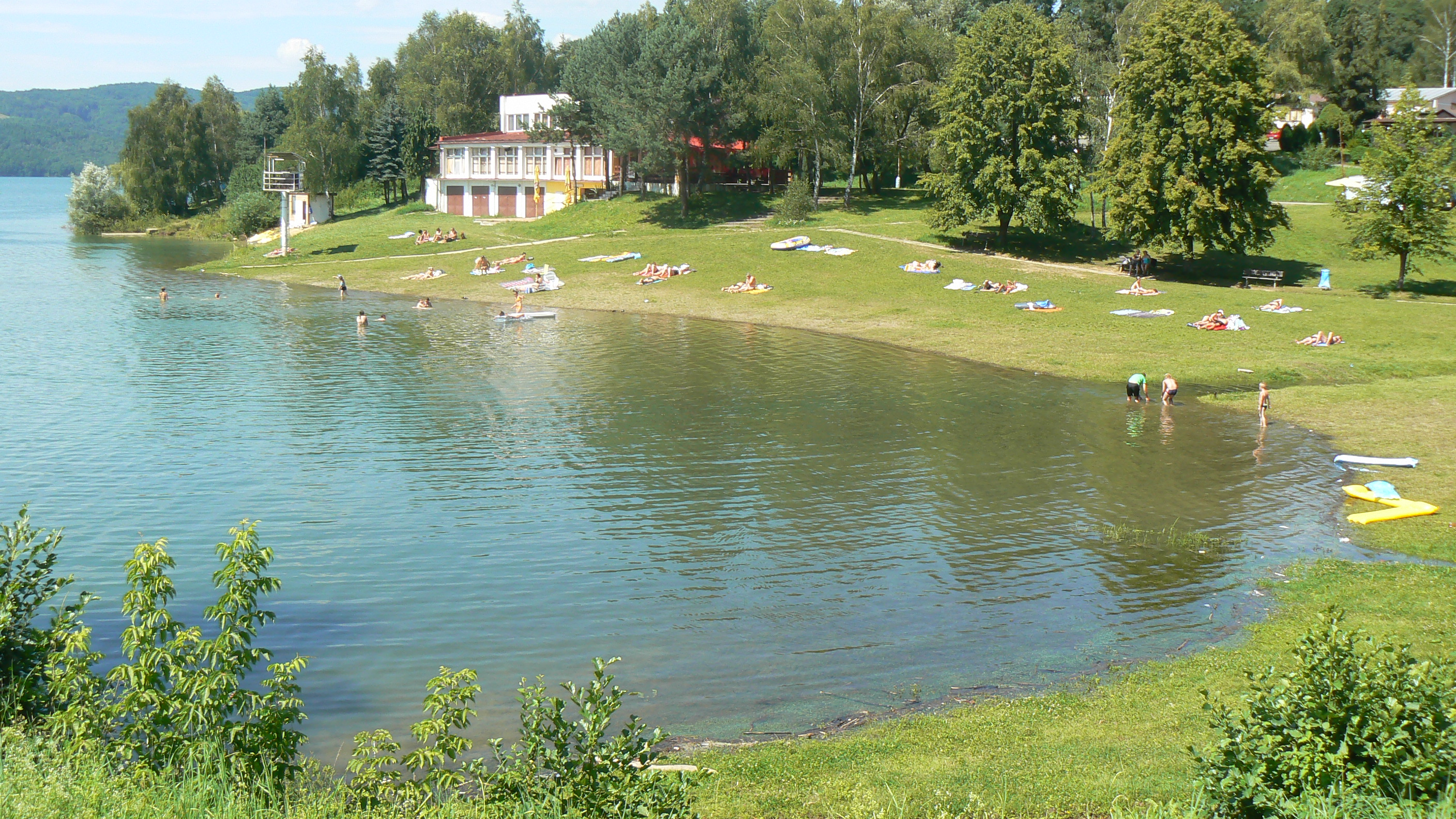 Vodné dielo Veľká Domaša.